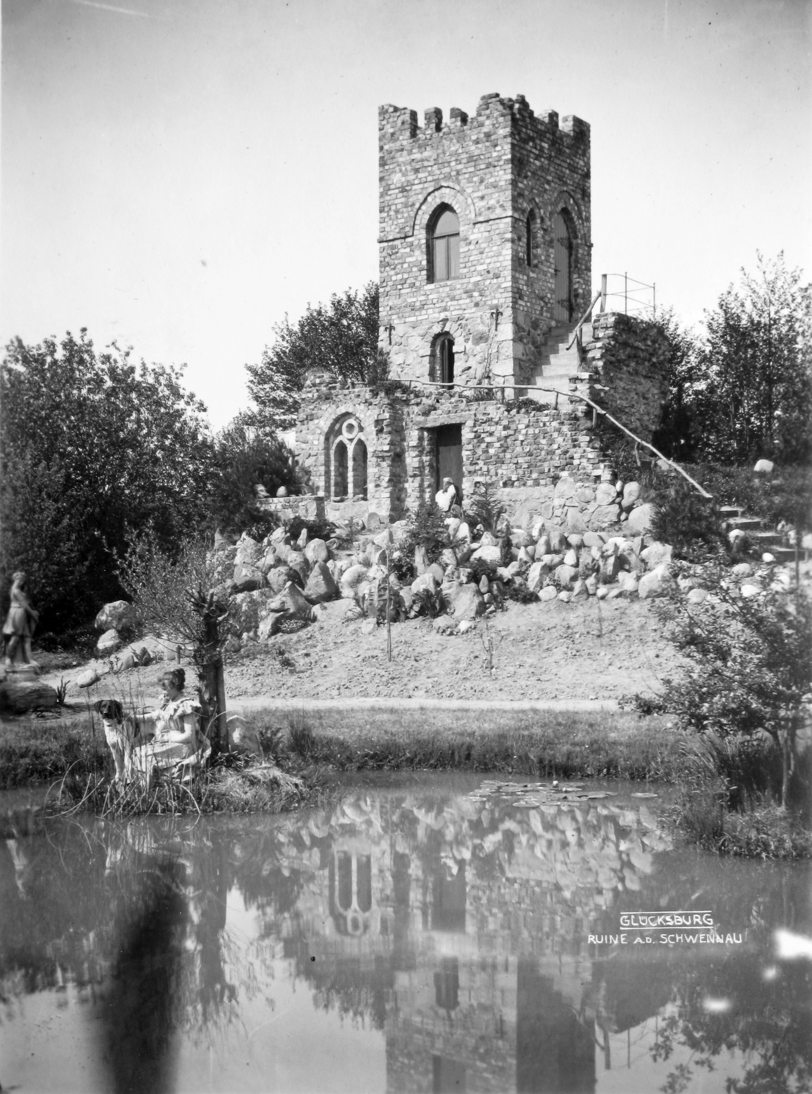 historische Fotographie der Turmruine Erlkron, um 1910